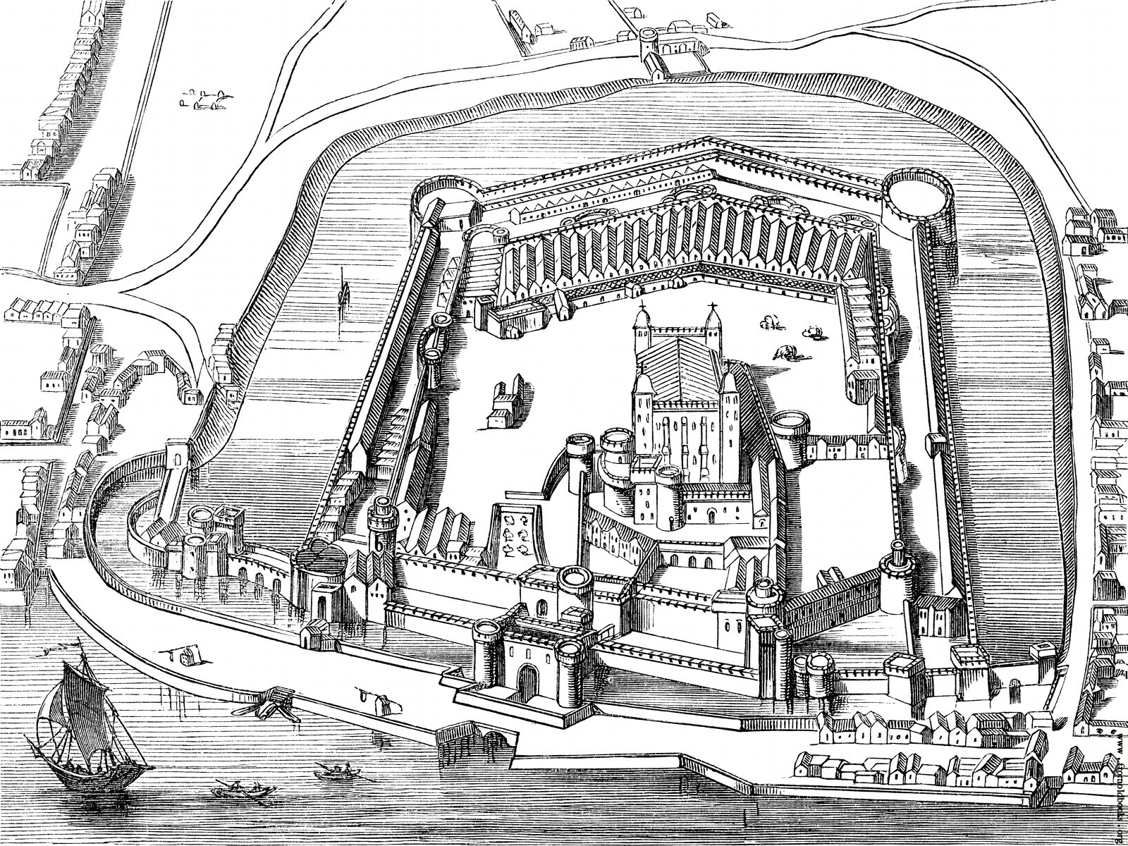 Ο Πύργος του Λονδίνου, γύρω στο 1600